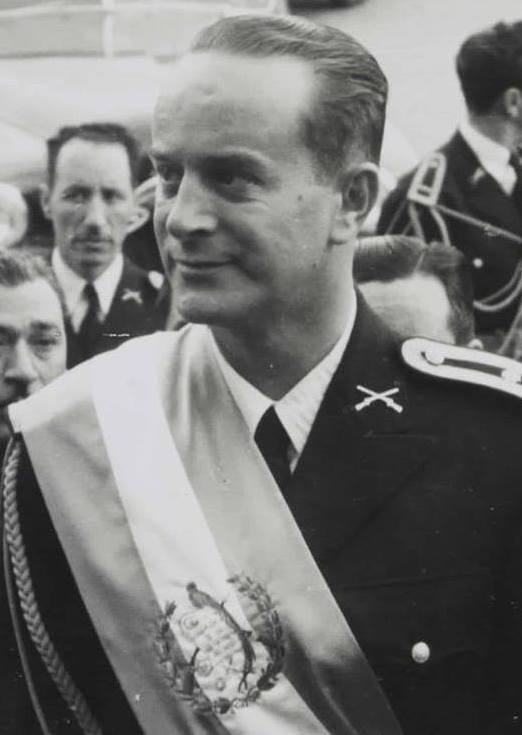 Presidente Jacobo Árbenz Guzmán durante su nombramiento como Comandante de las Fuerzas Armadas.